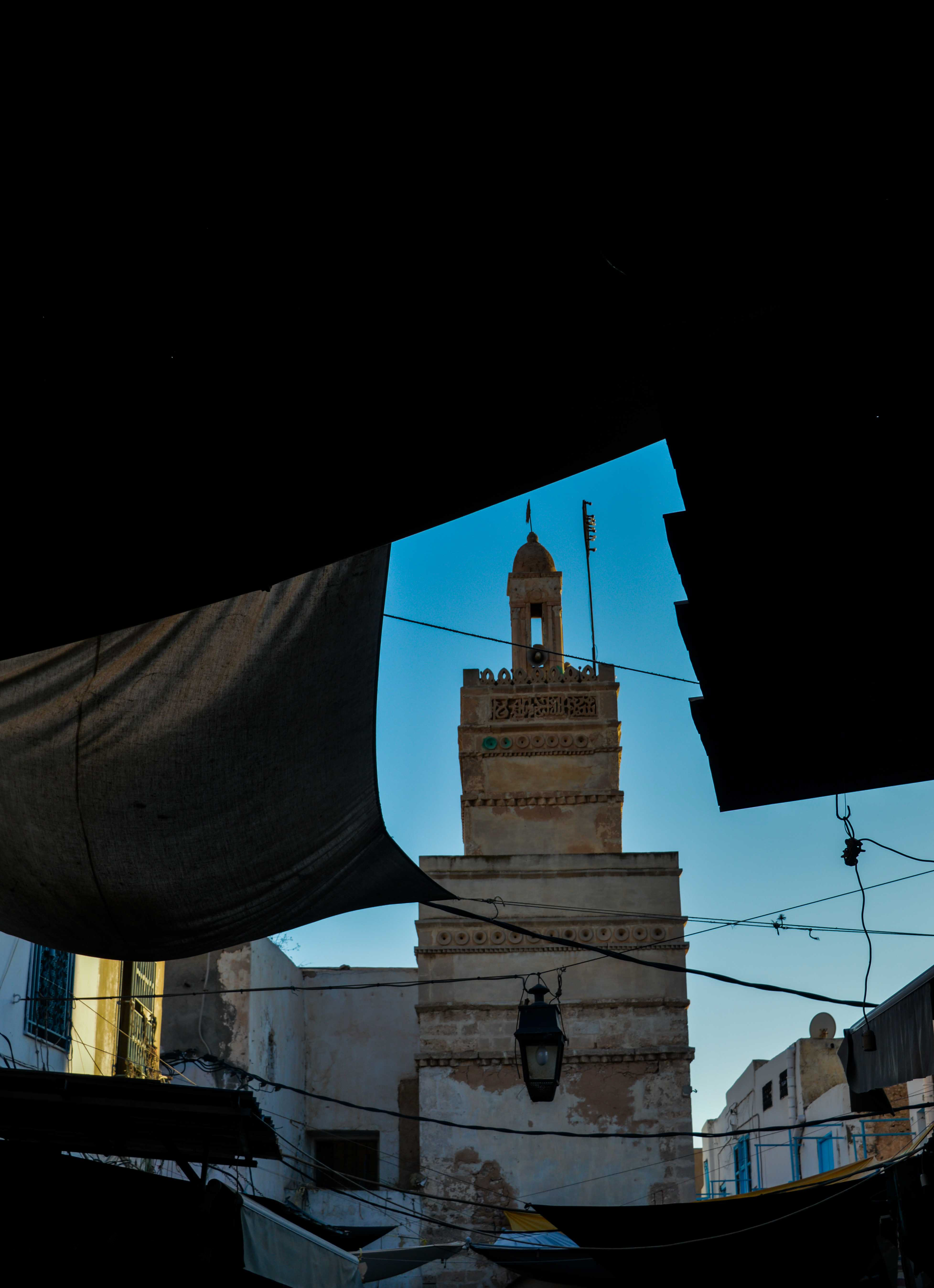 Minaret de la mosquée Bou Chouaïcha à Sfax (Tunisie)